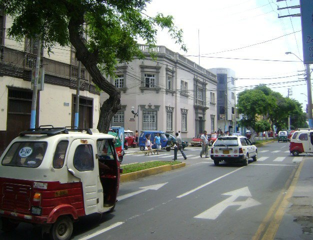 Frontis del Local del Centro Social de Huacho en la Avenida Grau.